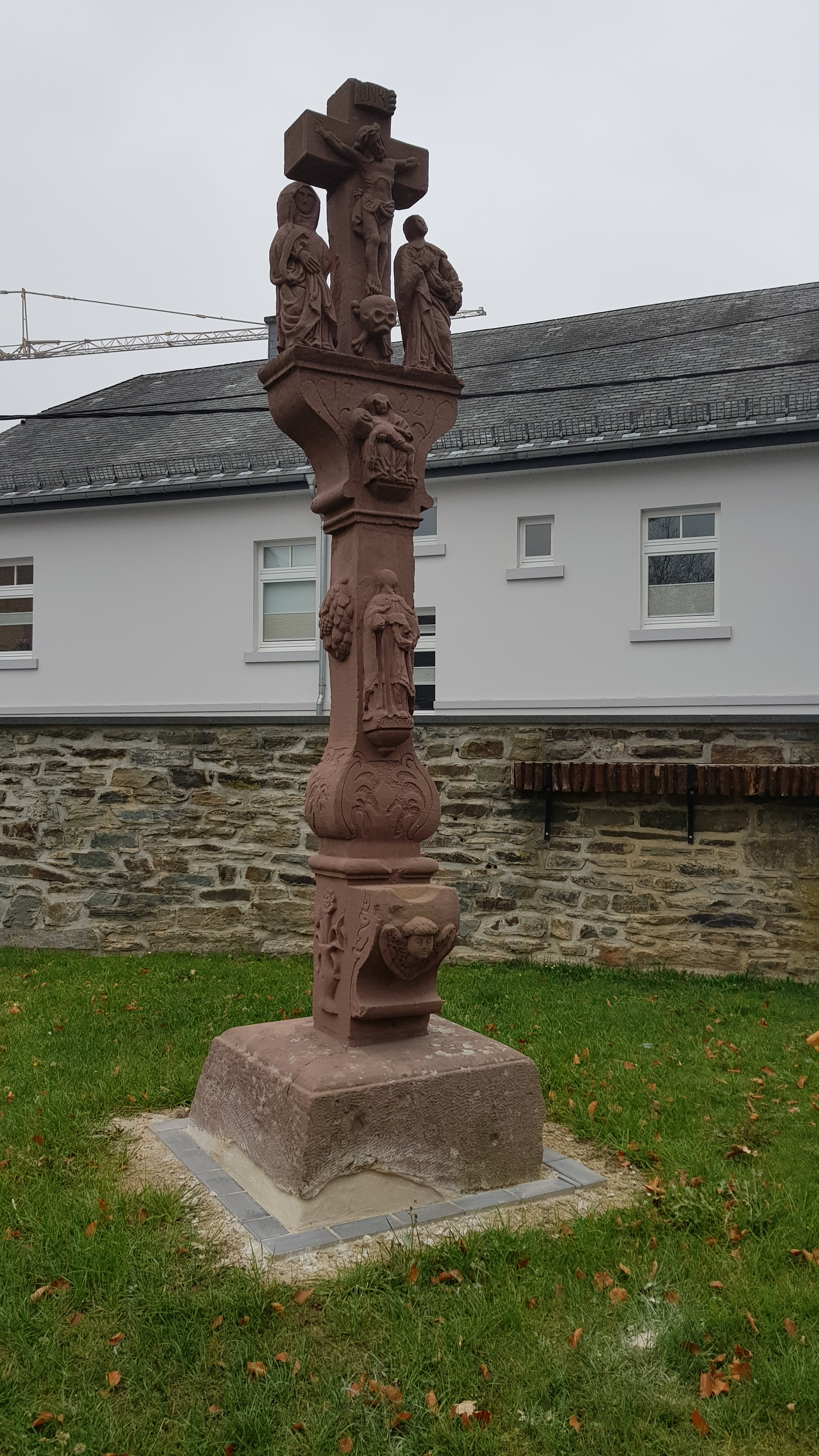 Marktkreuz bei Kirche St. Hubertus, Amel, Belgien This photo of immovable heritage has been taken in the Walloon Region